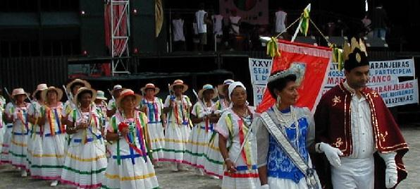 Taieiras de Lagarto (Gérson), durante Encontro de Folclore e Laranjeiras (2001)